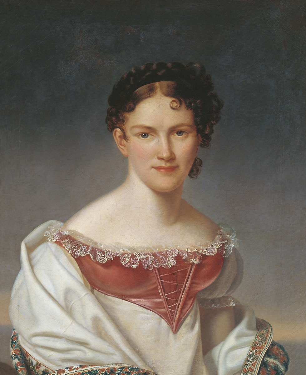 Авдотья Ильинична Истомина (1799-1848)